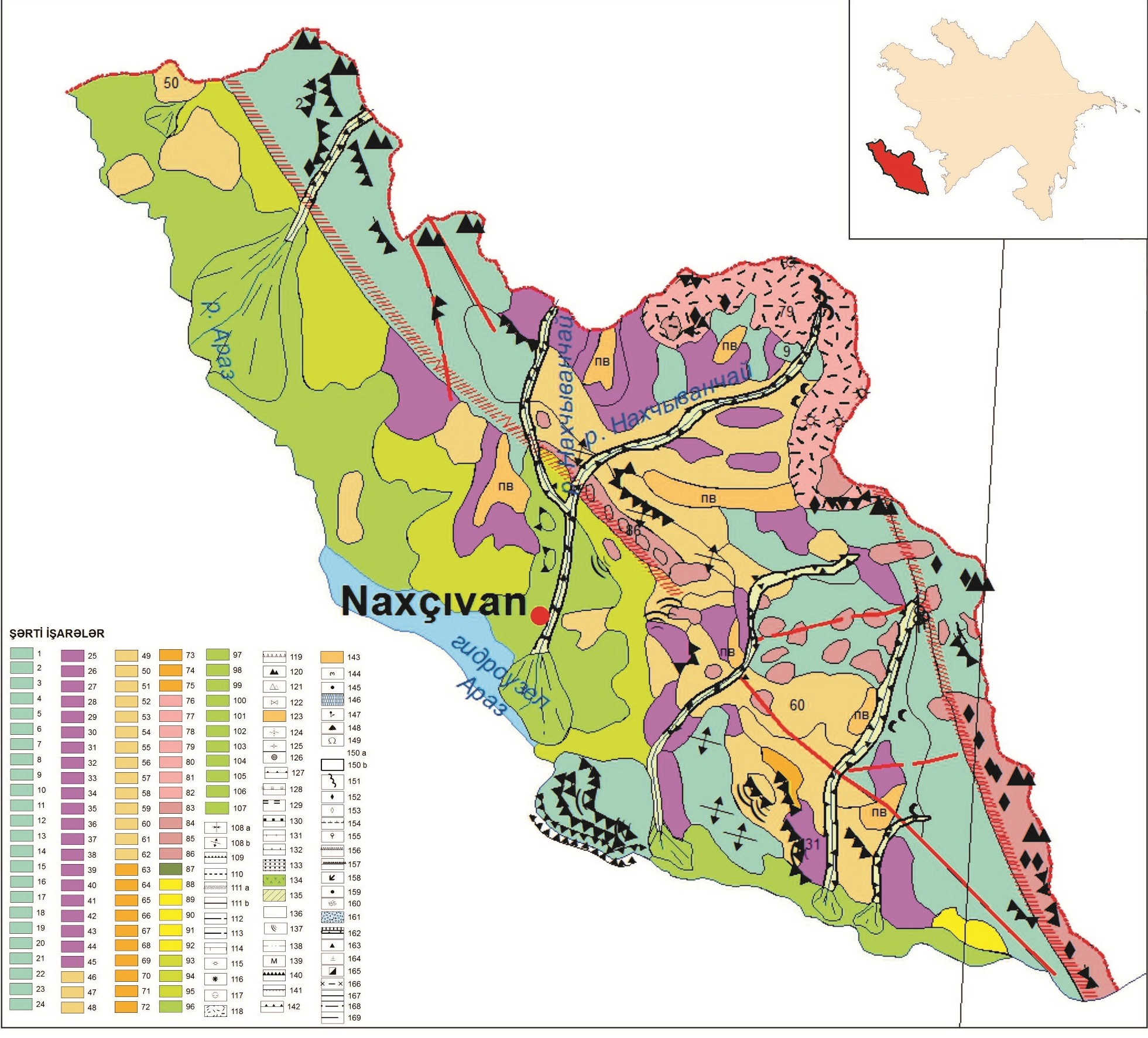 Orta Araz təbii vilayətinin geomorfoloji xəritəsi.